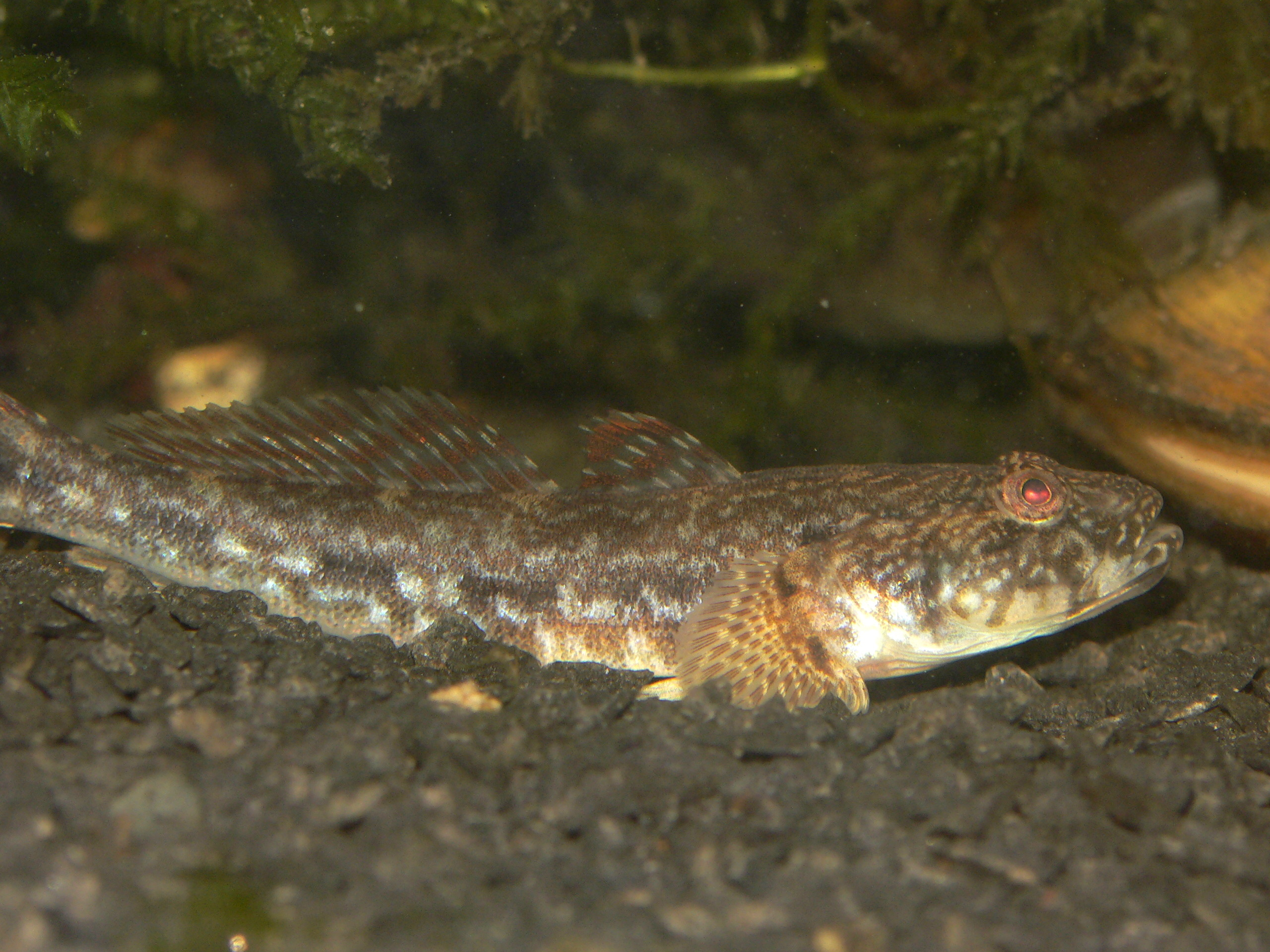 Neogobius kessleri from the Nederrijn Arnhem.